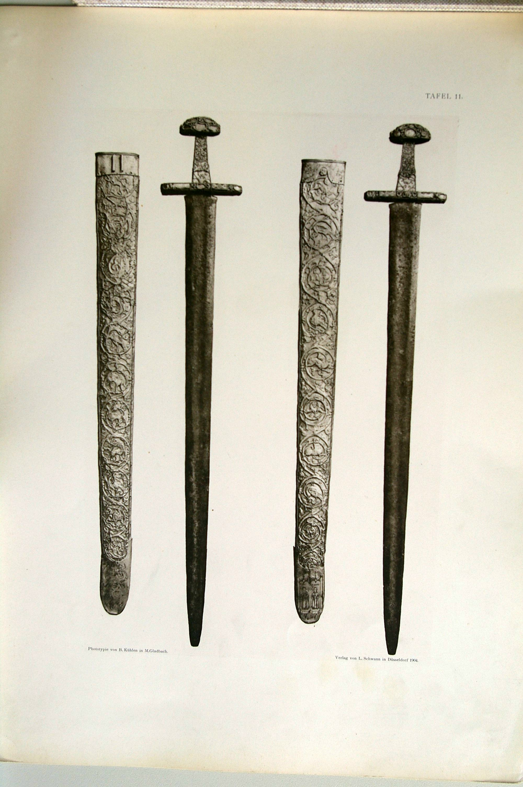 Tafel 11 von Georg Humanns „Die Kunstwerke der Münsterkirche zu Essen“, 1904: Schwert (10.–11. Jahrh.)